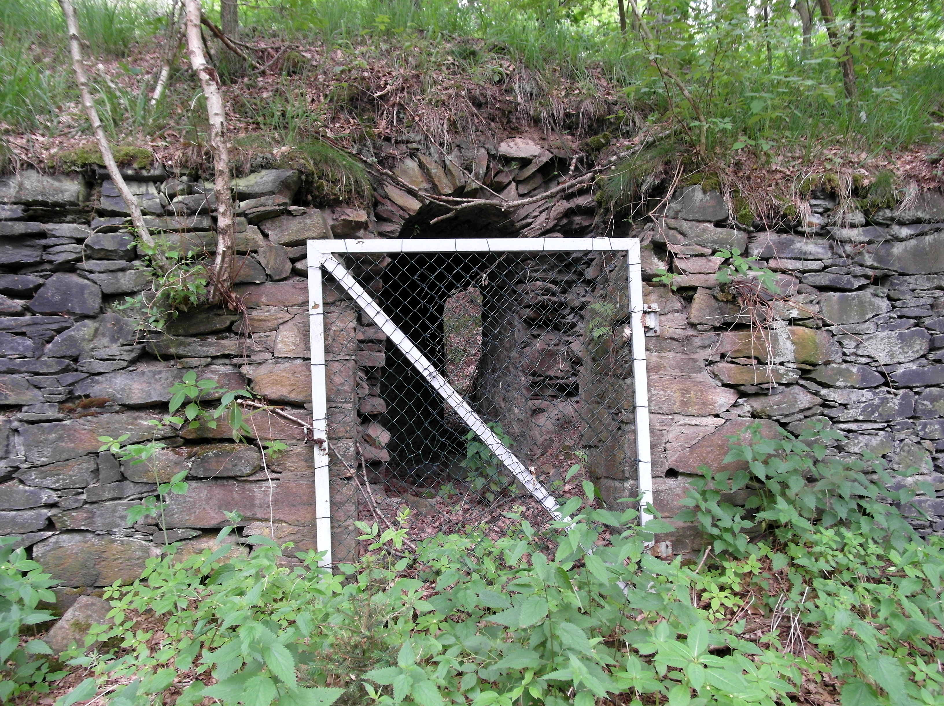 17.06.2017 09627 Hilbersdorf (Bobritzsch-Hilbersdorf): Zufahrt zur Alten Dynamit (GMP: 50.897321,13.394195). Zugang zu aus Explosionsschutzgründen separierte Fertigungsstätten. Hierbei handelt es sich um "Einzelarbeitsplätze" der dezentralen Produktion der "Alten Dynamit". In den früher mit Balken überdachten kleinen Höfen im Wald arbeiteten dort wegen der Explosionsgefahr maximal 2 Personen. Hinter dem Erdwall kam der nächste Arbeitshof. [SAM0490.JPF]20170617545DR.JPG(c)Blobelt